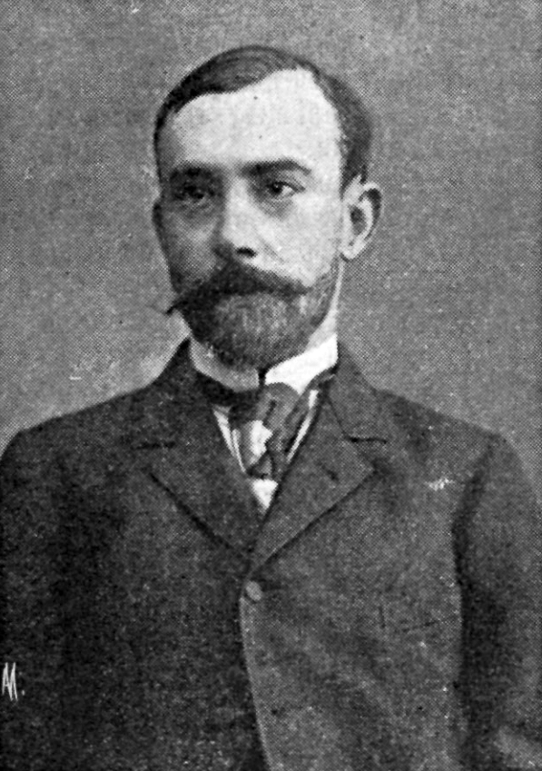 Александър Ростковски